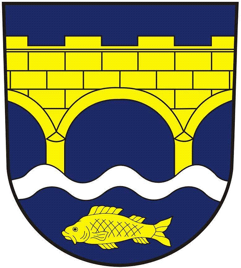 Znak obce Vitiněves